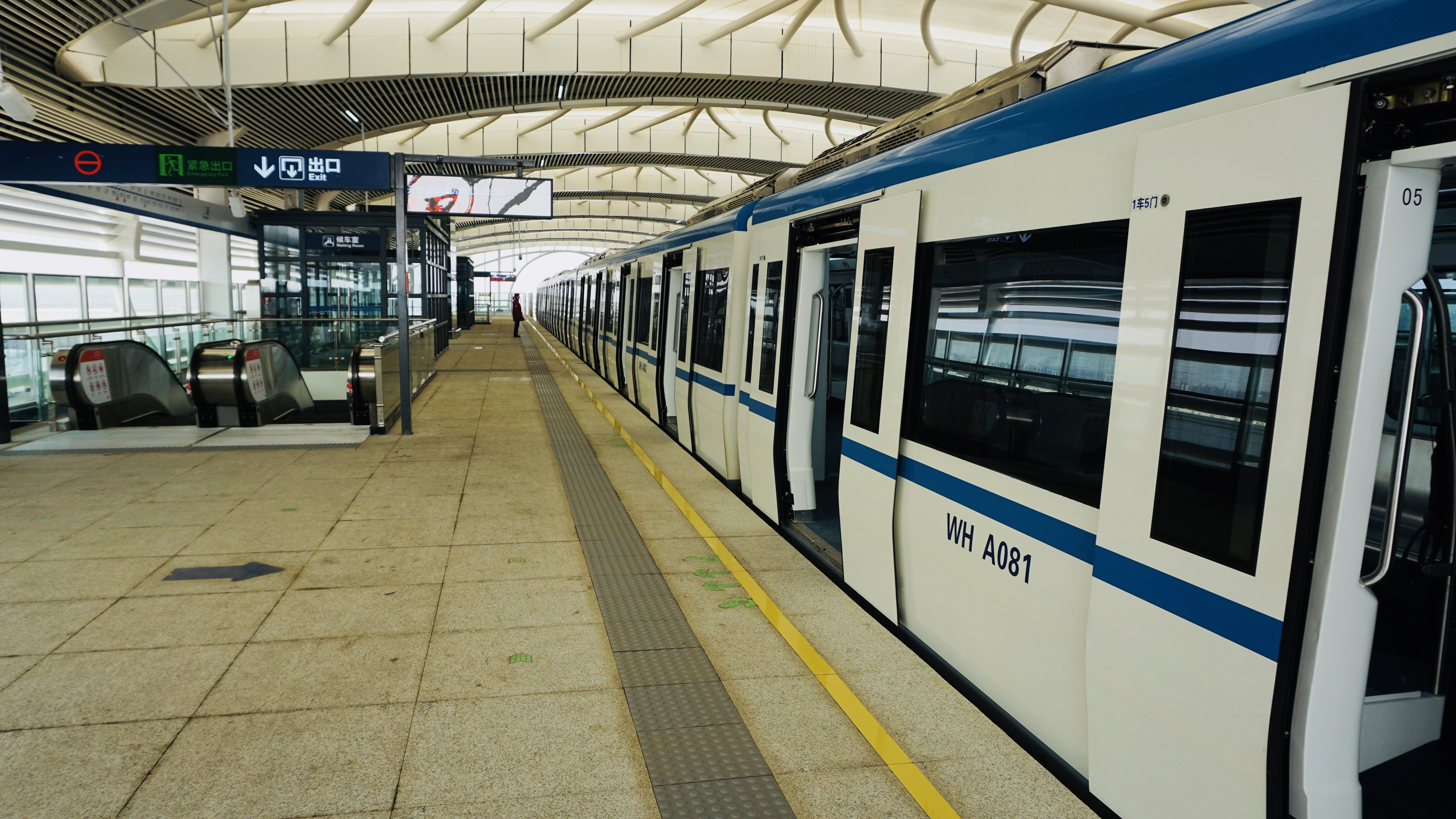 武汉轨道交通1号线列车停靠三店站